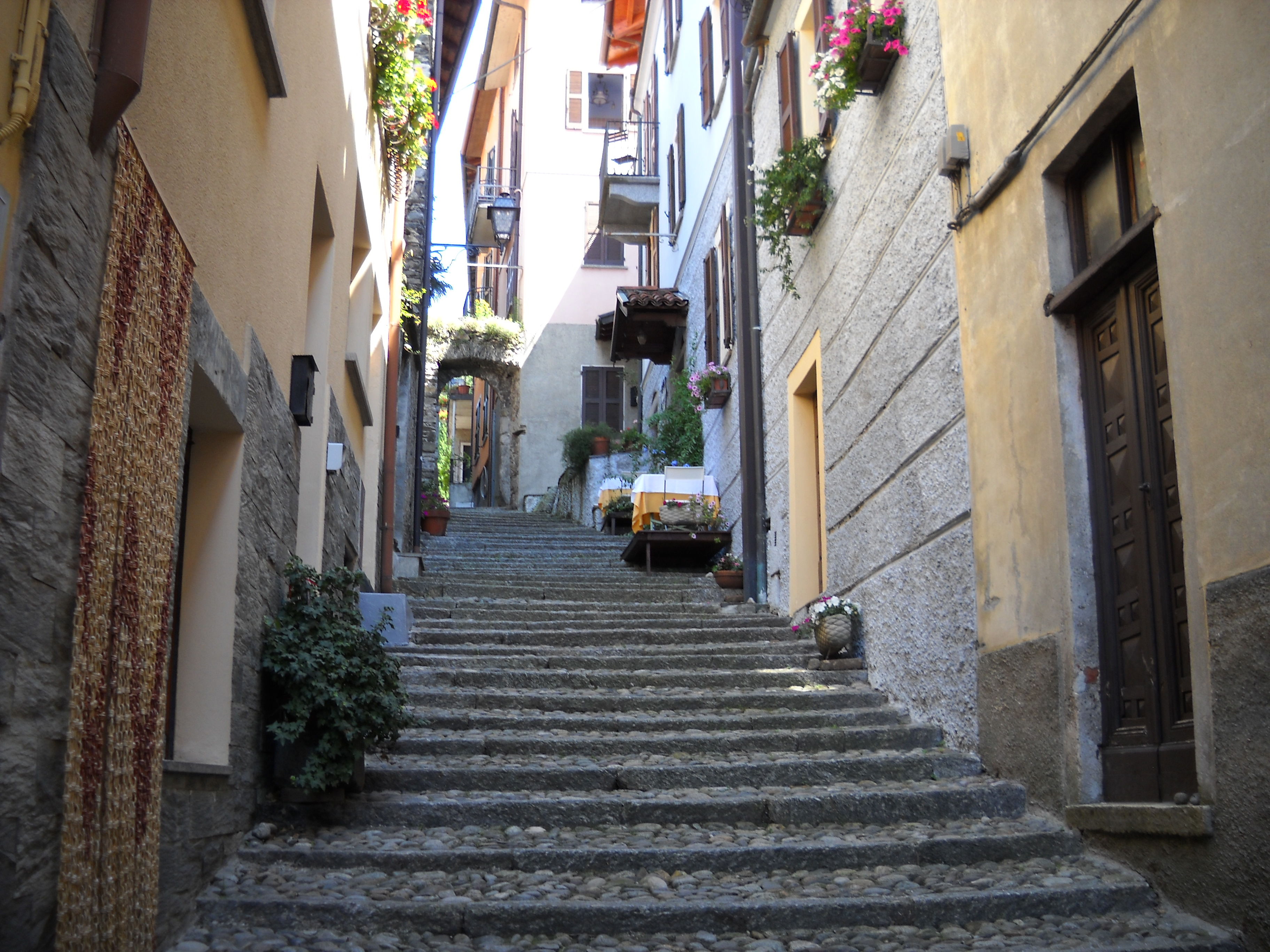 contrada